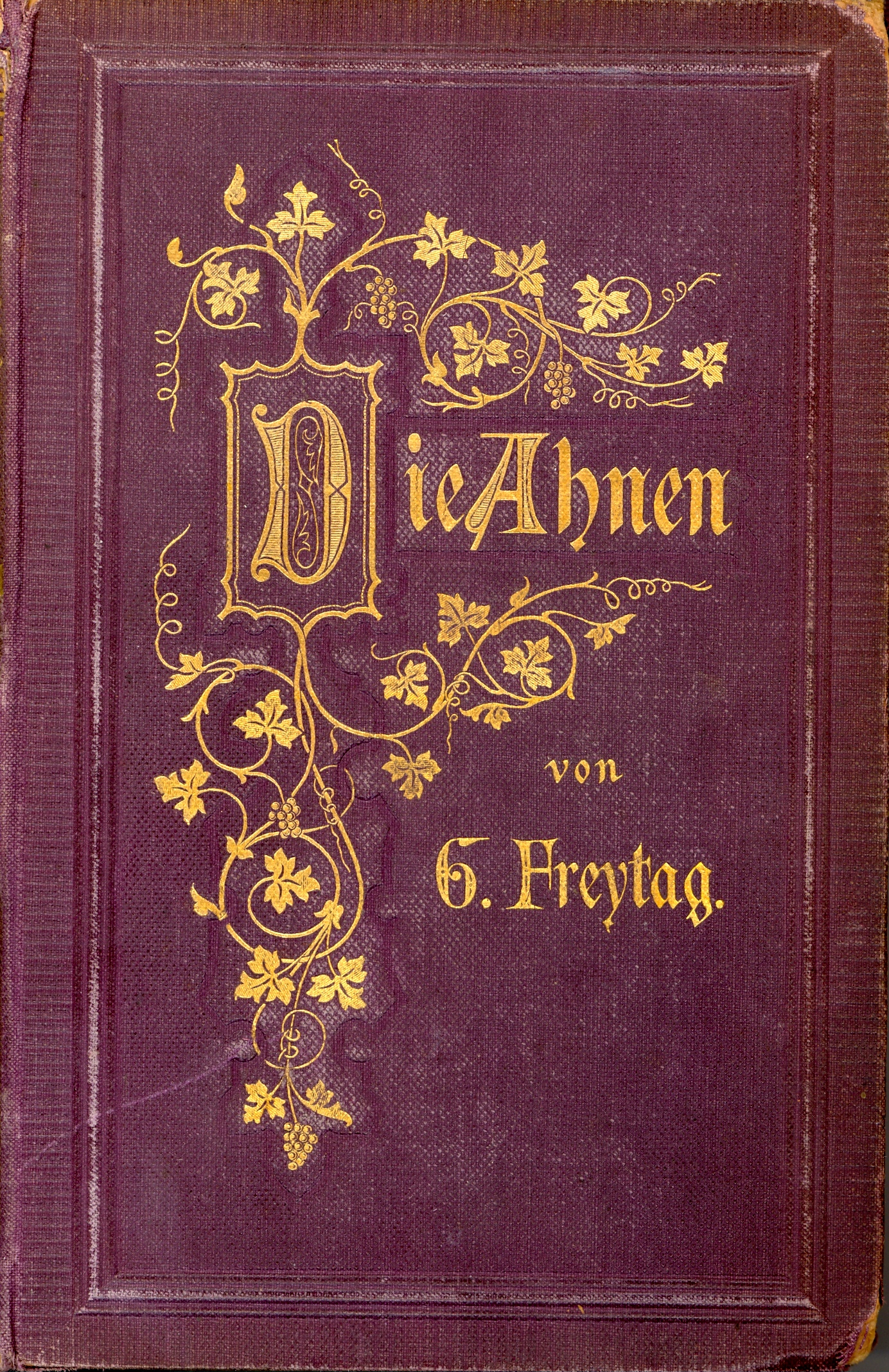 Gustav Freytag, Die Ahnen, Dritte Abtheilung, Buchdeckel der (vermutlich) Erstausgabe, Verlag S(amuel) Hirzel, Leipzig, 1874